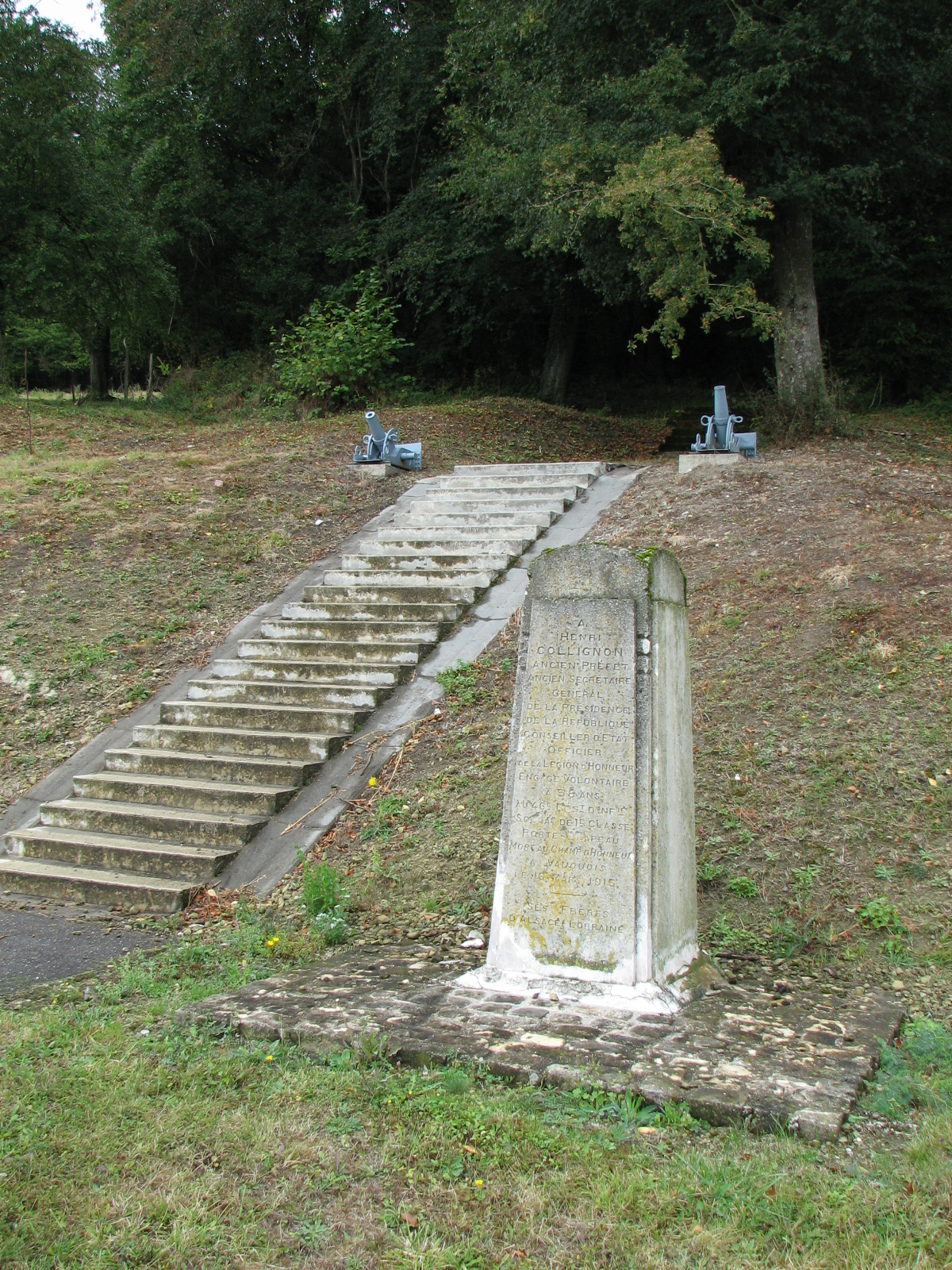 Borne dédiée à Henri Collignon (1856-1915) au pied de la butte de Vauquois, dans la Meuse.